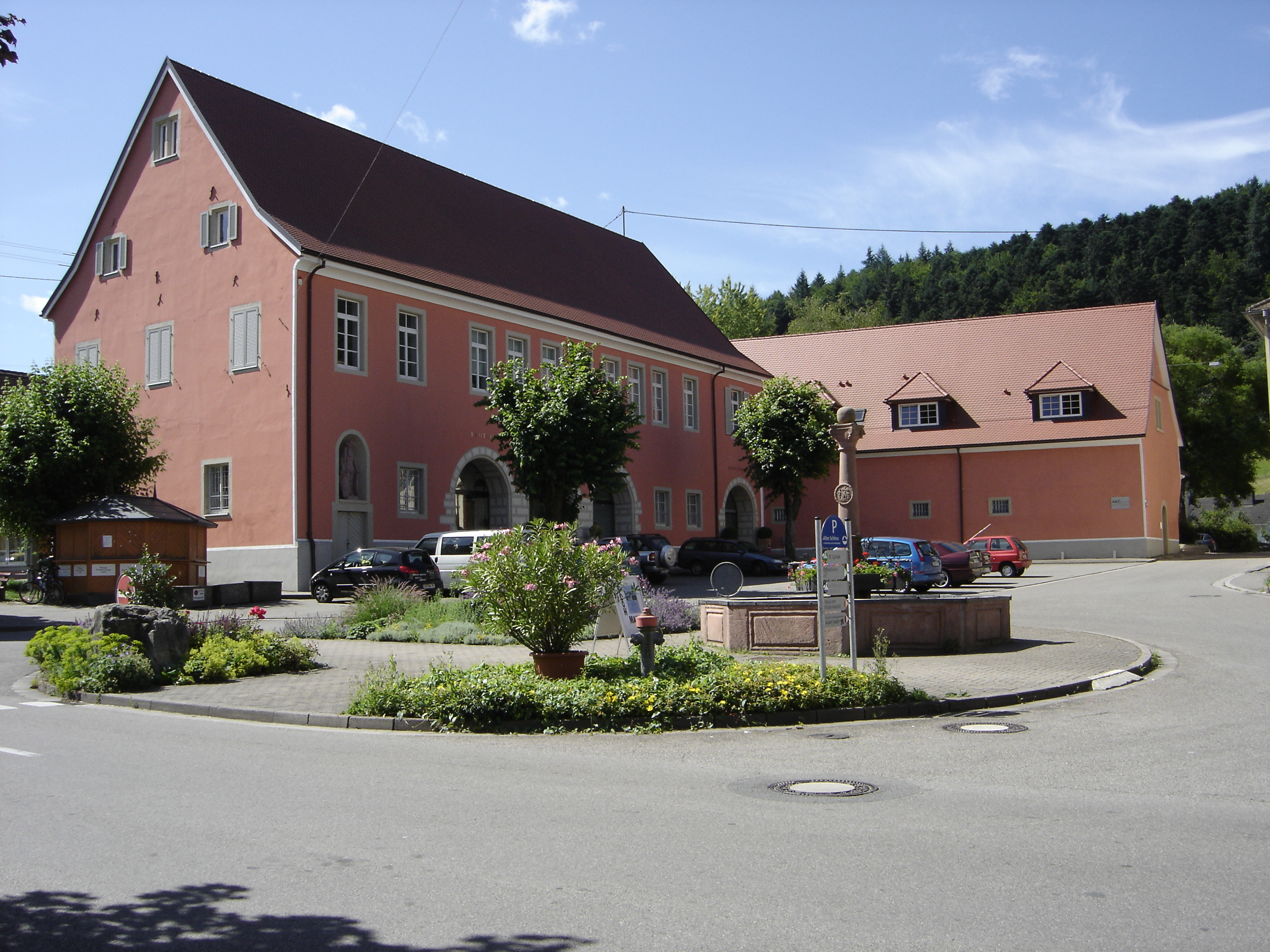 Das Sulzburger Schloss